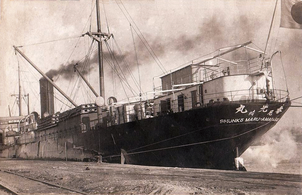 Jedna ze sedmi japonských lodí (Liverpool-Maru, Karatchi-Maru, Capeton-Maru, Italy-Maru, Scotland-Maru, Yonan-Maru a Shunko-Maru), které se podílely na transportu československých legionářů z Vladivostoku do Evropy. Tyto lodě byly najaty Ústřední hospodářskou komisí československého vojska, která byla zřízena ve Vladivostoku. Konkrétně se jednalo v pořadí o 15. transport legionářů z Vladivostoku. Japonský zaoceánský parník "Shunko Maru" (Shunko-Maru, v překladu "Jitřní paprsek", 120 metrů dlouhý) vyplul z Vladivostoku na Štědrý den 24. prosince 1919, do Terstu (italsky Trieste) doplul 12. února 1920. Na své palubě přivezl 1025 důstojníků a vojáků.